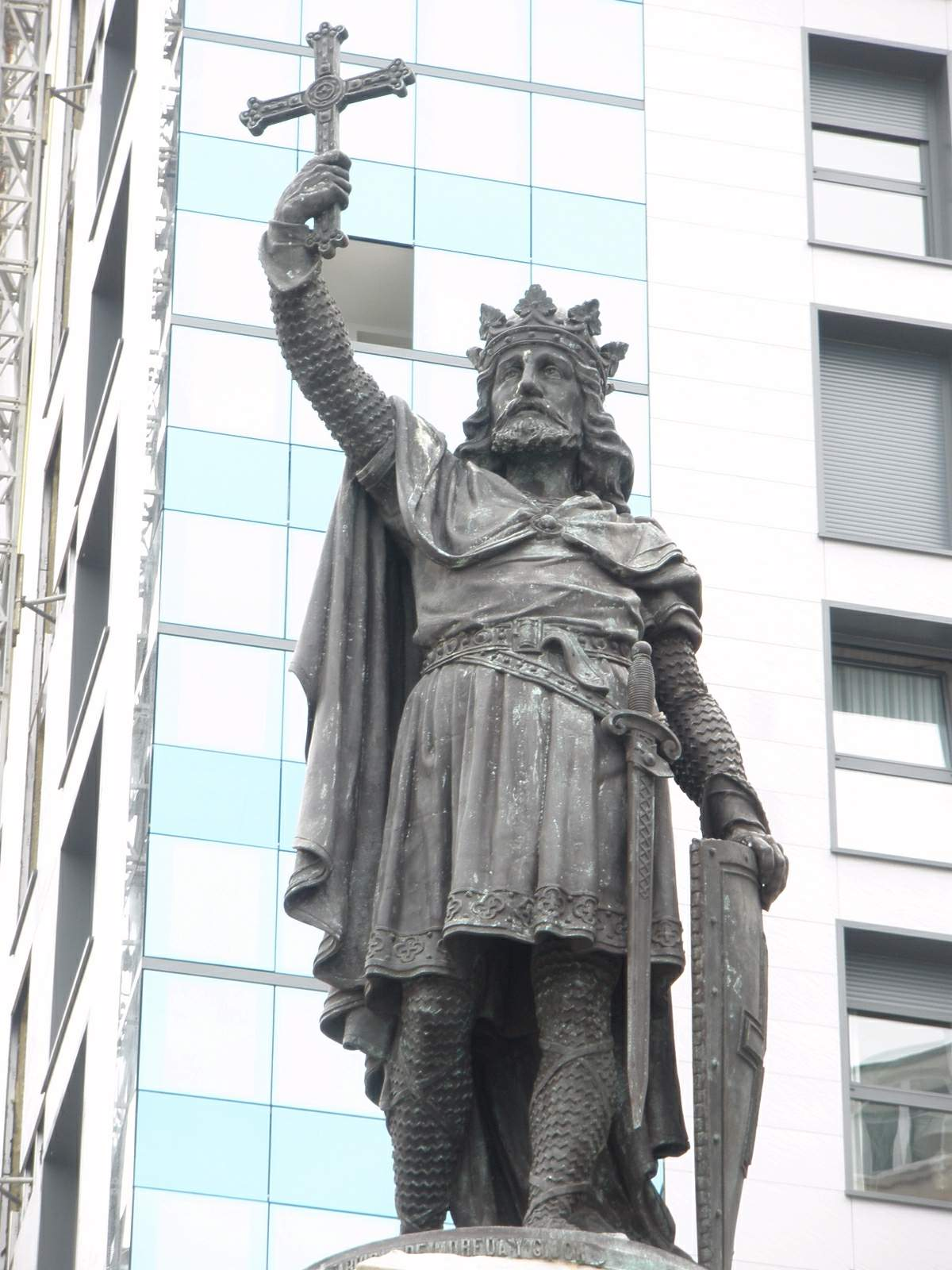 Gijón - Plaza del Marqués, Monumento a Pelayo